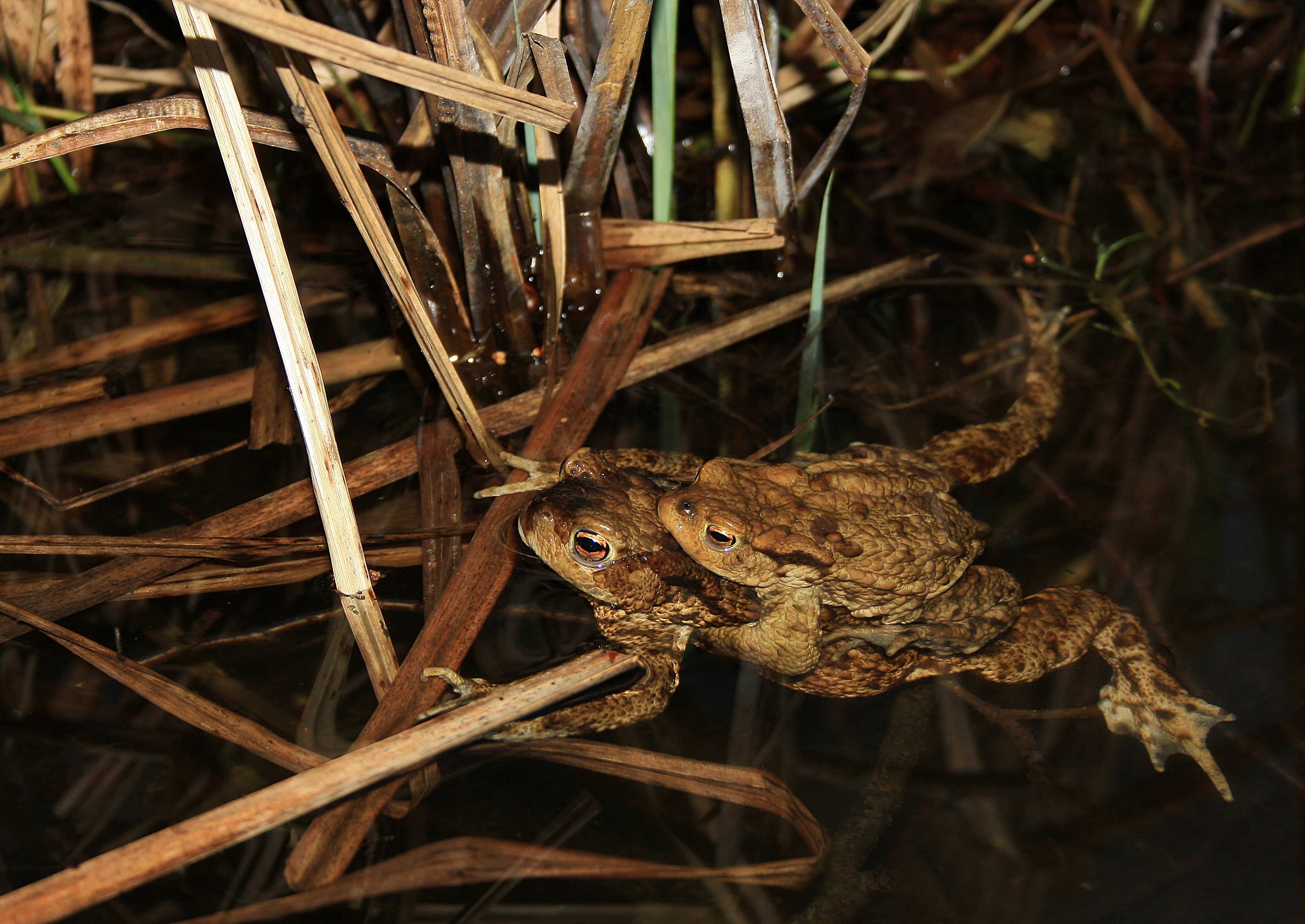 Erdkrötenpaar (Amplexus) im Laichgewässer (Langer See bei Rehfelde)